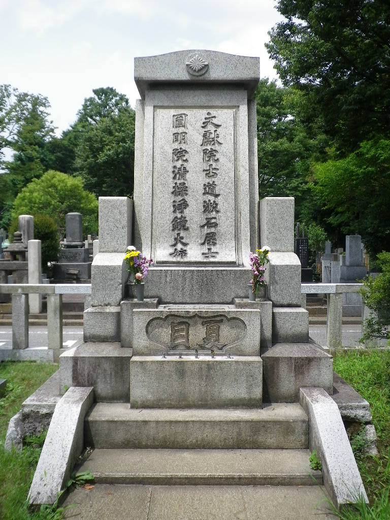 夏目漱石の墓